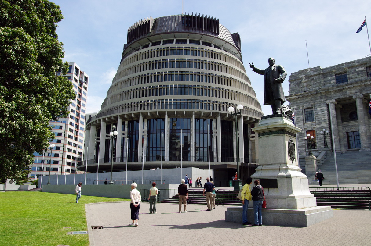 Beehive, Wellington